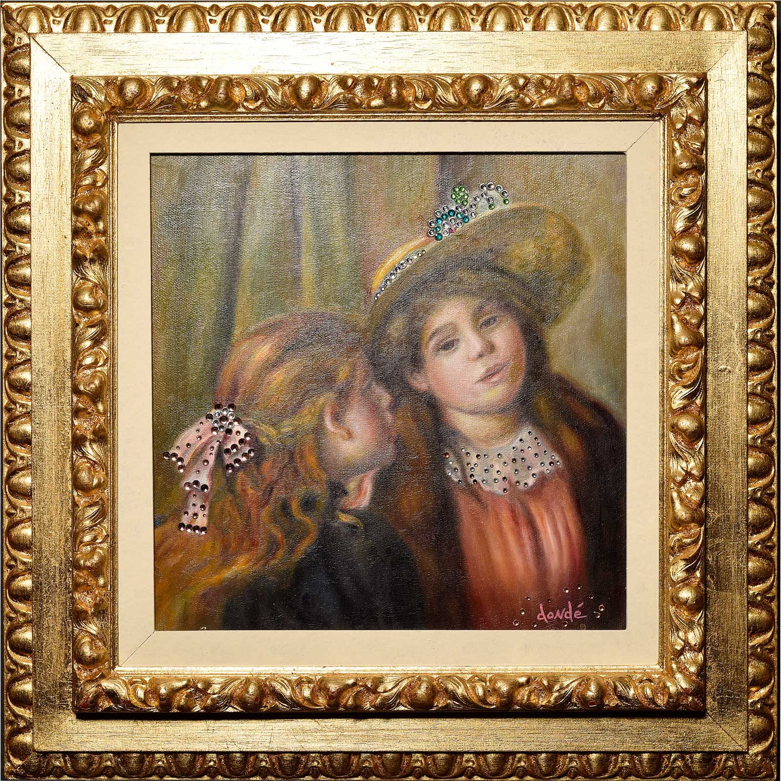 Legale Meisterkopie von Renoirs Les Deux Soeurs von Dondé, mit Goldelementen veredelt